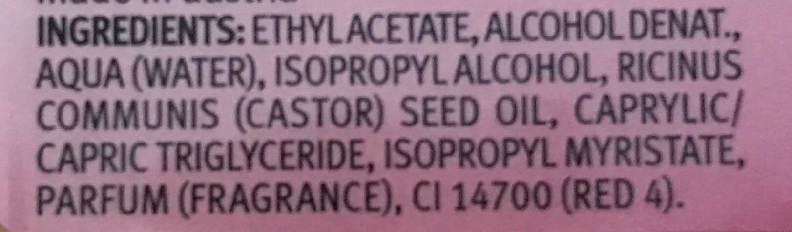 Inhaltstoffe von acetonfreiem Nagellackentferner